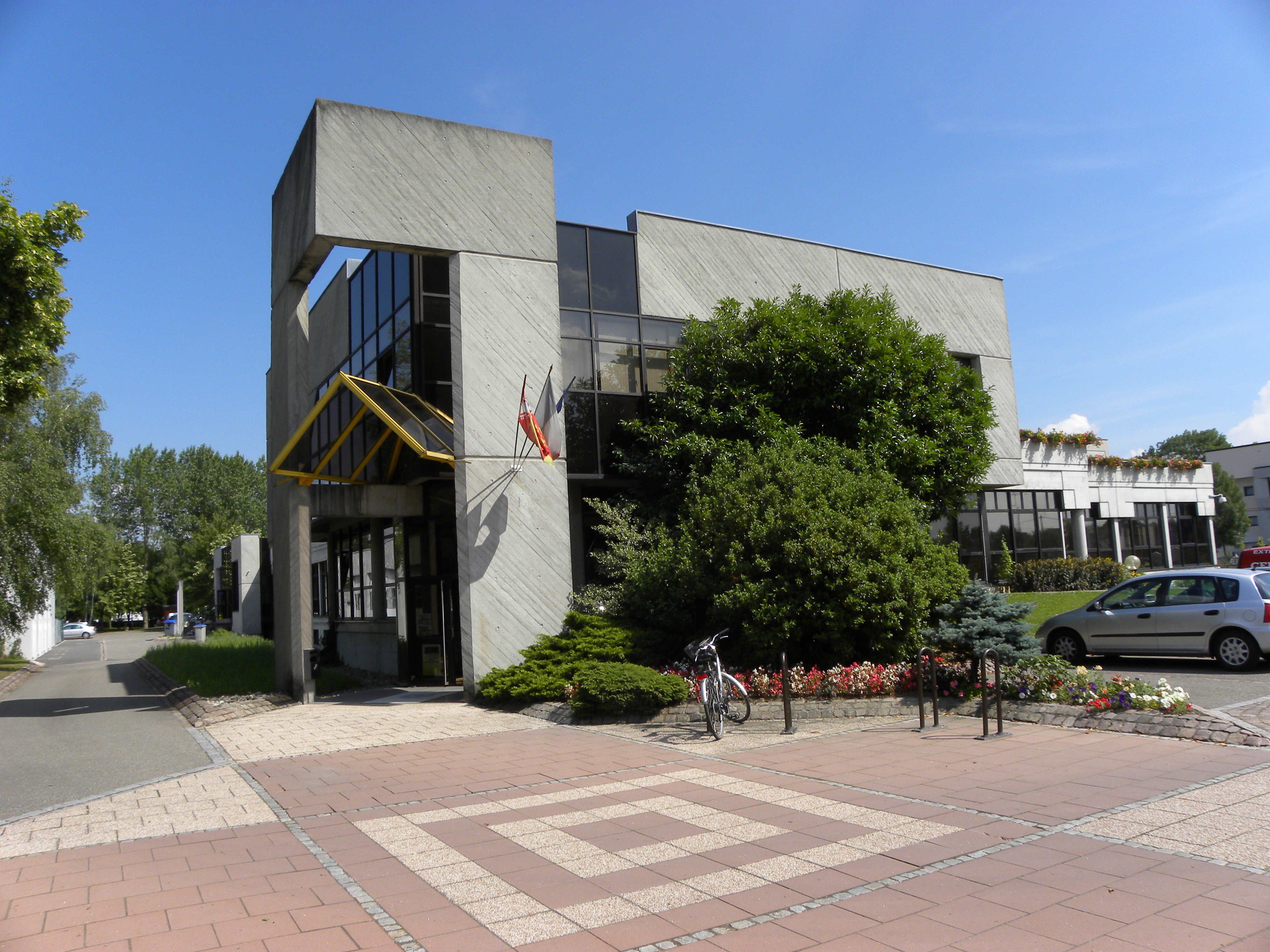 La ville d'Ostwald se situe en Alsace, dans le Bas-Rhin. Elle fait partie de l'Eurométropole de Strasbourg et compte plus de 12 000 habitants. L'hôtel de ville regroupe les services administratifs, techniques et espaces verts.